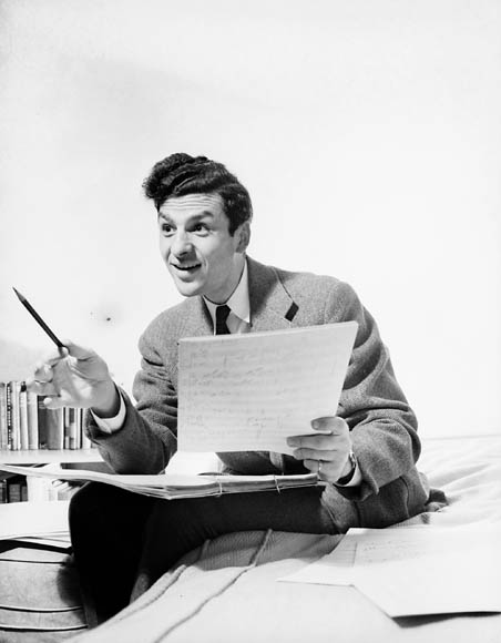 Louis Applebaum, Dec 1945